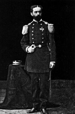 Perteneció al Regimiento de Artillería de Marína durante la Guerra del Pacífico